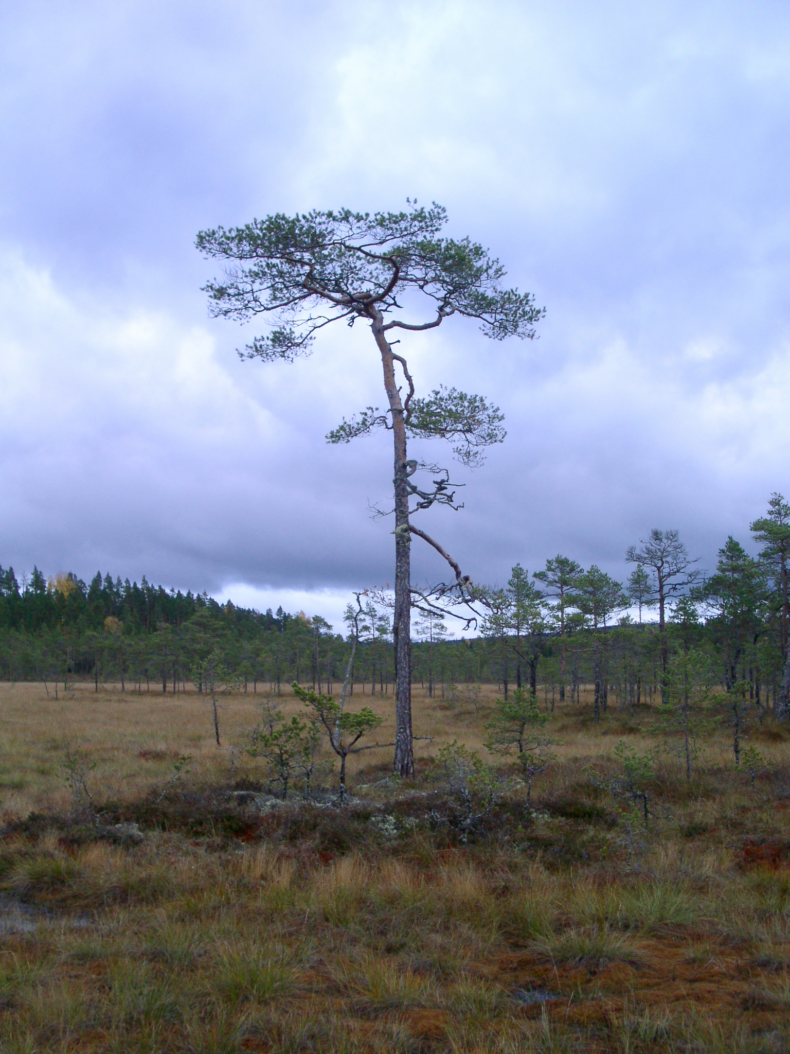 A pine tree (Pinus sylvestris) on a peat bog, near Björbo, Dalarna, Sweden. En tall ensam på en myr nära Björbo, Dalarna